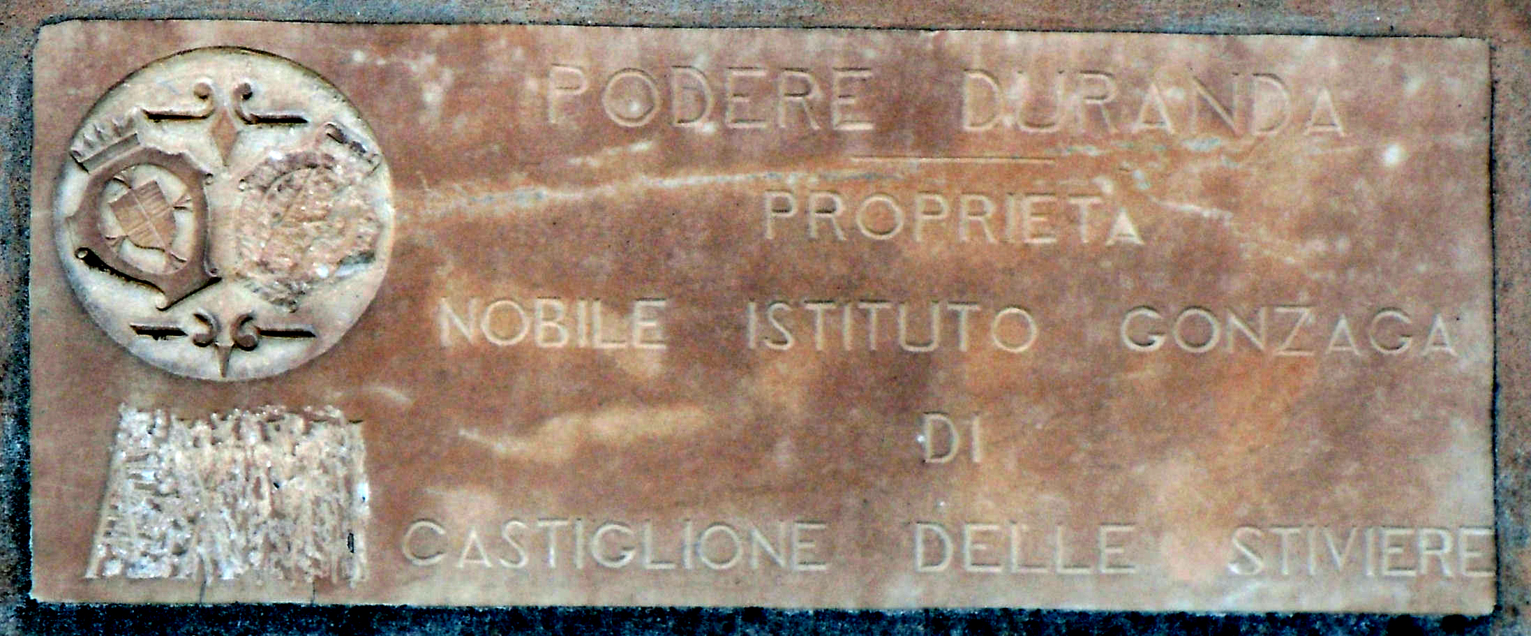 Casaloldo, località Molinello Sotto, lapide podere Duranda.